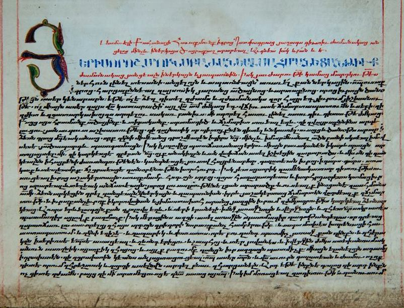 Страница из рукописи «Выборки из исторических книг» армянского историка Самуела Анеци